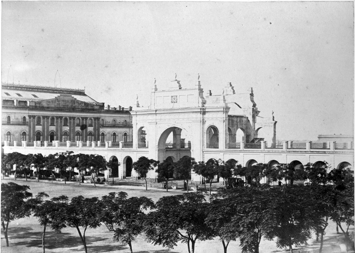 Vieja Recova ubicada en la actual Plaza de Mayo, Buenos Aires, Argentina. A la izquierda puede verse el viejo edificio del Teatro Colón.